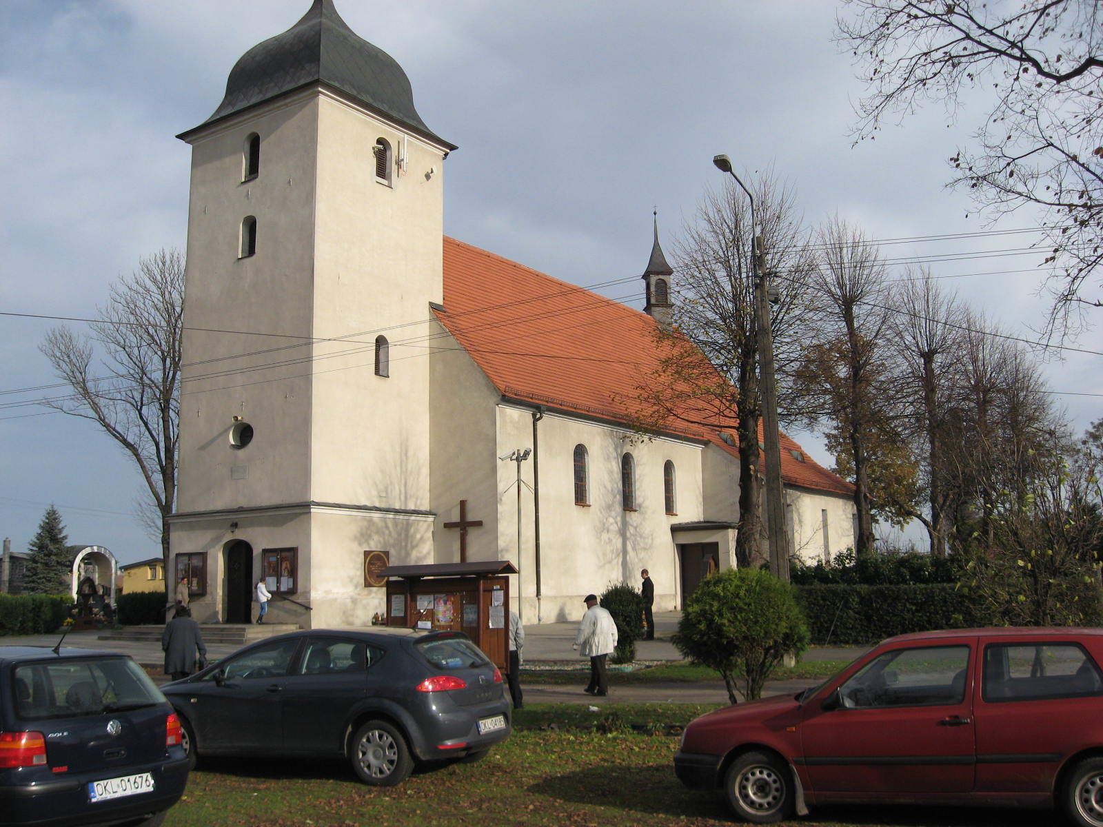 Widok ogólny